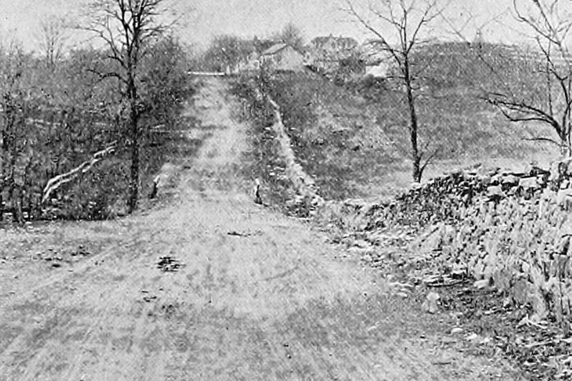 Valley Turnpike, Virginia.